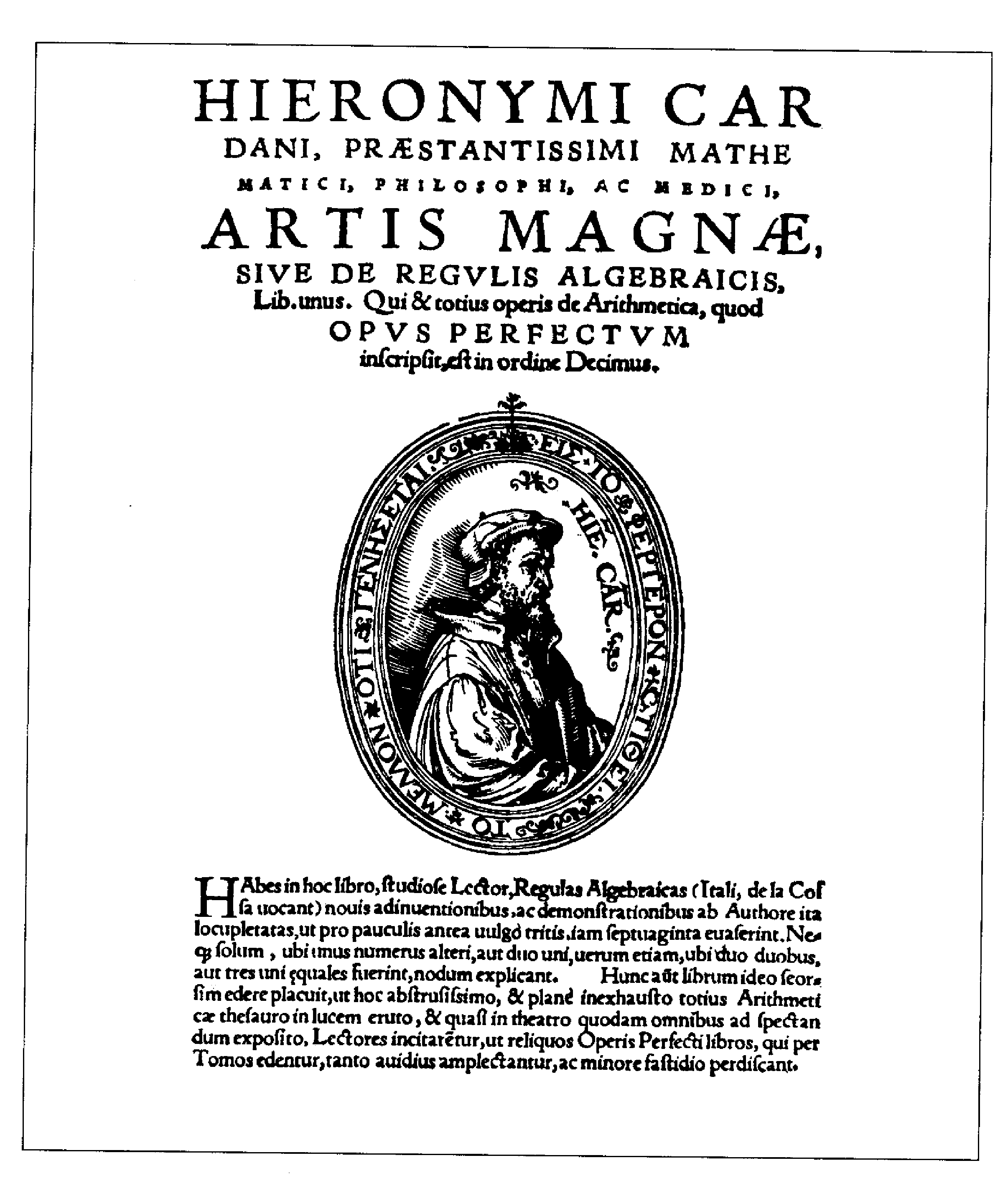 Page de couverture du livre Arsmagna de Jérôme Cardan datant de 1545. Le livre est maintenant dans le domaine publique. Licensing Jean-Luc W 22 septembre 2006 à 19:42 (CEST)